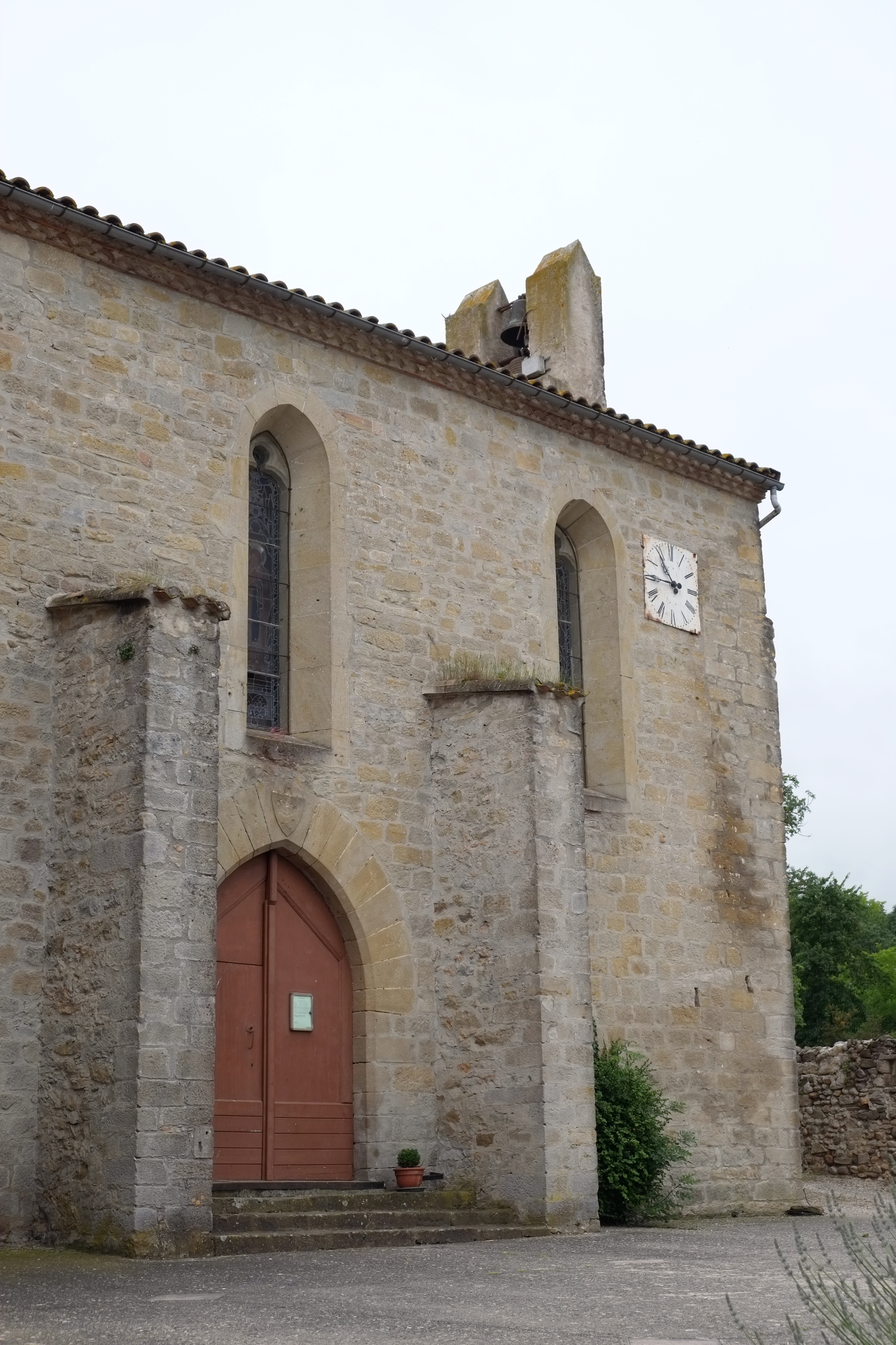 Kirche in Caudeval (Frankreich)